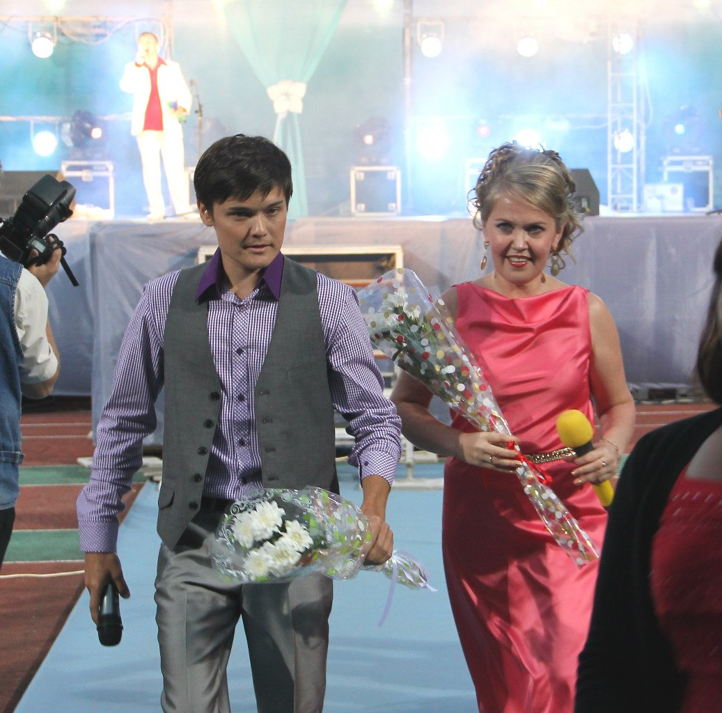 Марийские эстрадные исполнители Виктор Апталиков и Светлана Строганова